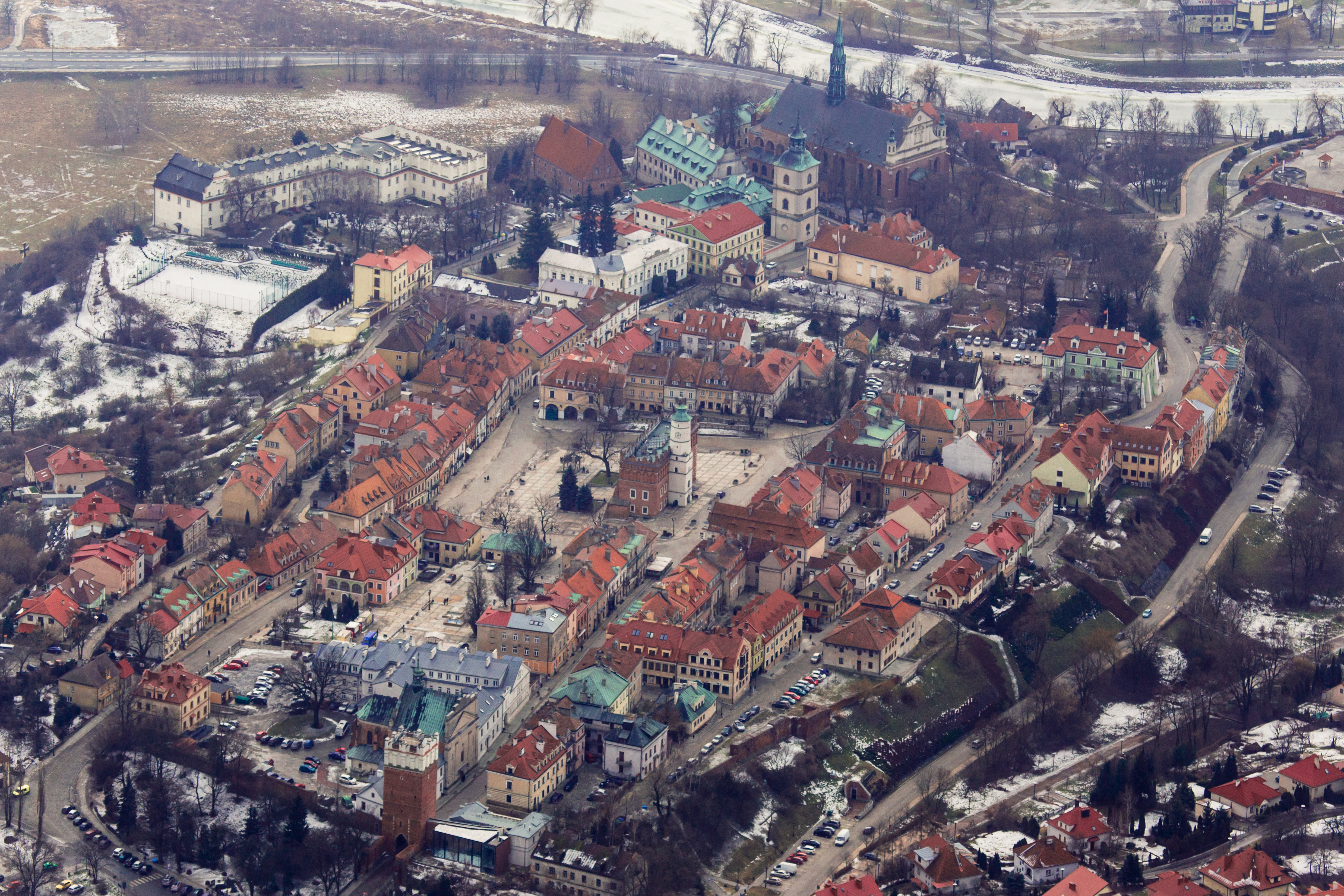 Rynek w Sandomierzu